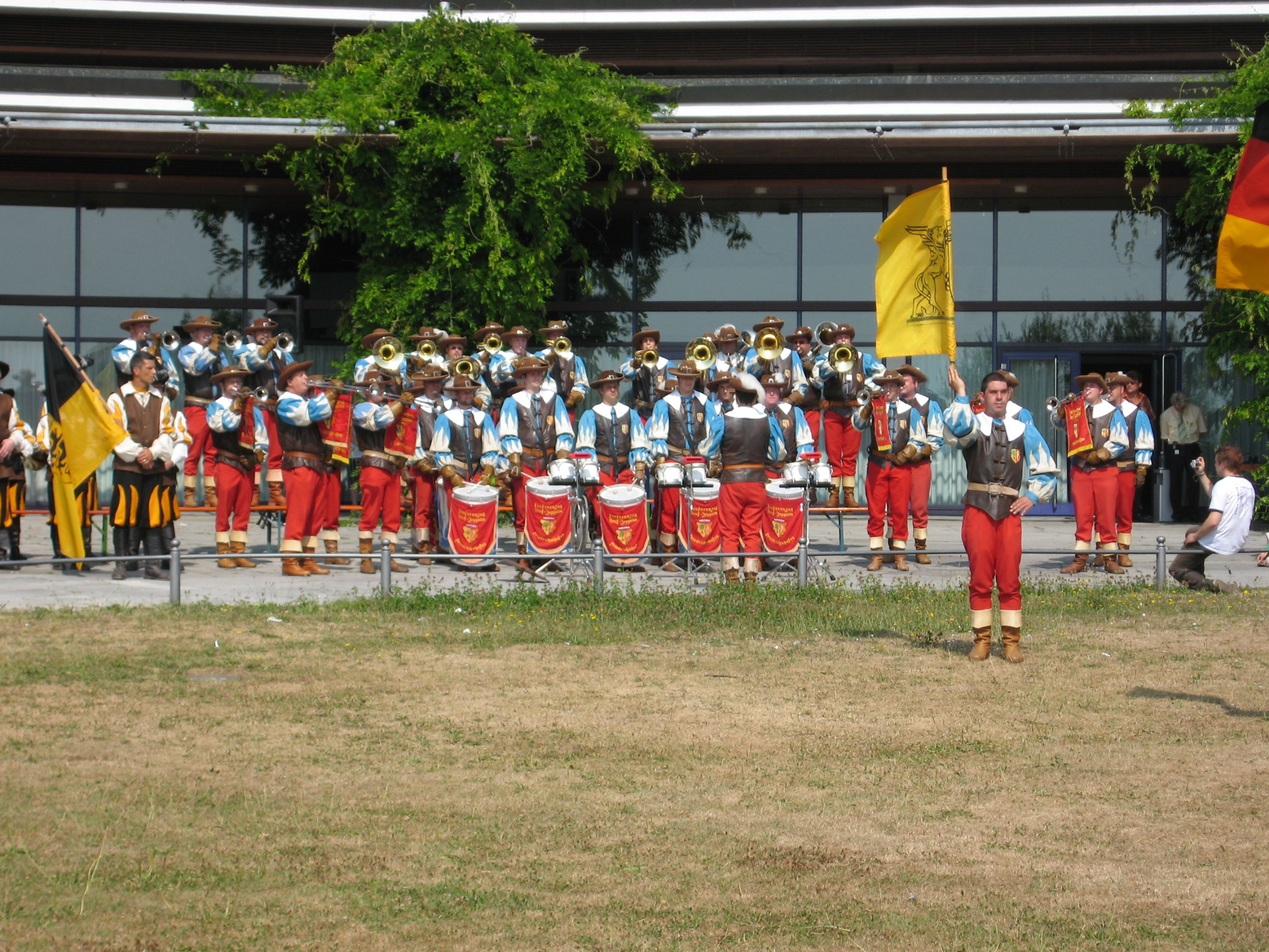 Der Fanfarenzug Graf-Zeppelin beim Standkonzert des Seehasenfestes 2006